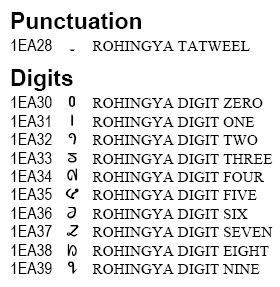 Rohingya digits